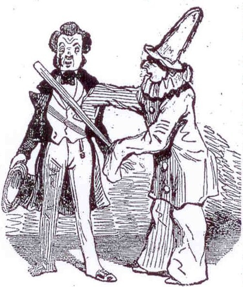 Scène du Carnaval de Paris : Pierrot ayant appliqué avec une latte spéciale sur le visage d'un homme la forme d'une grenouille.